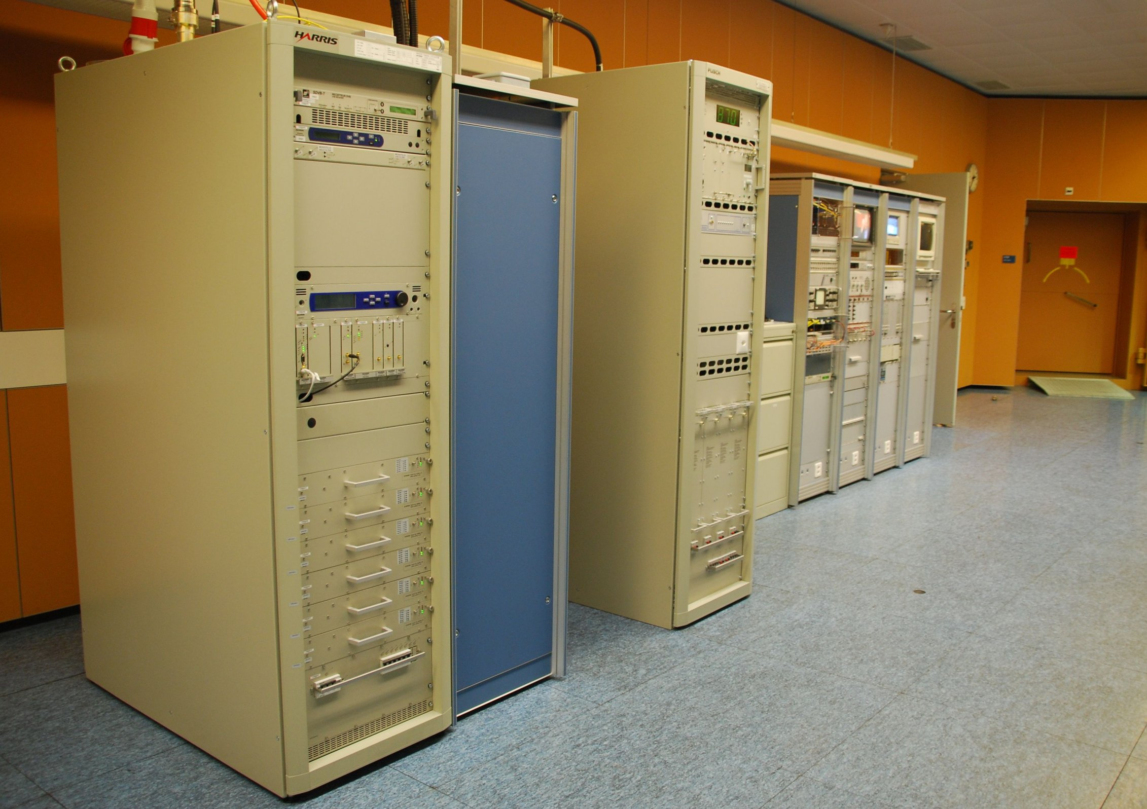 Senderaum des Fernsehturms St. Chrischona, Sendeanlagen für Digitalfernsehen, Radioprogramme und Kontrollstation